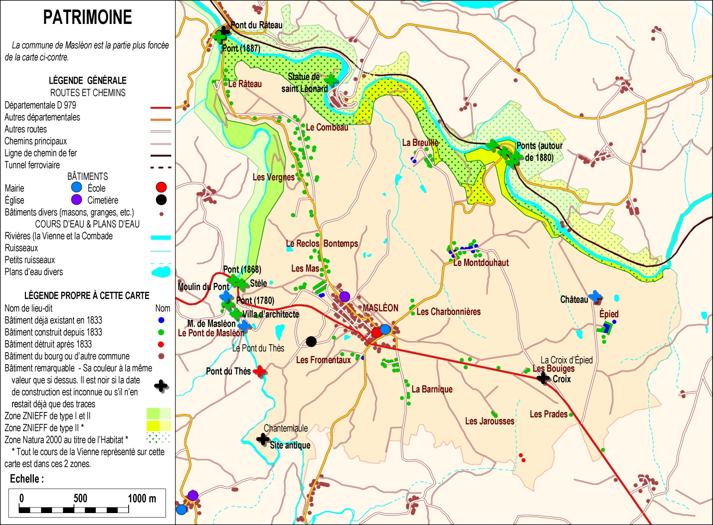 Carte du patrimoine bâti et naturel de Masléon